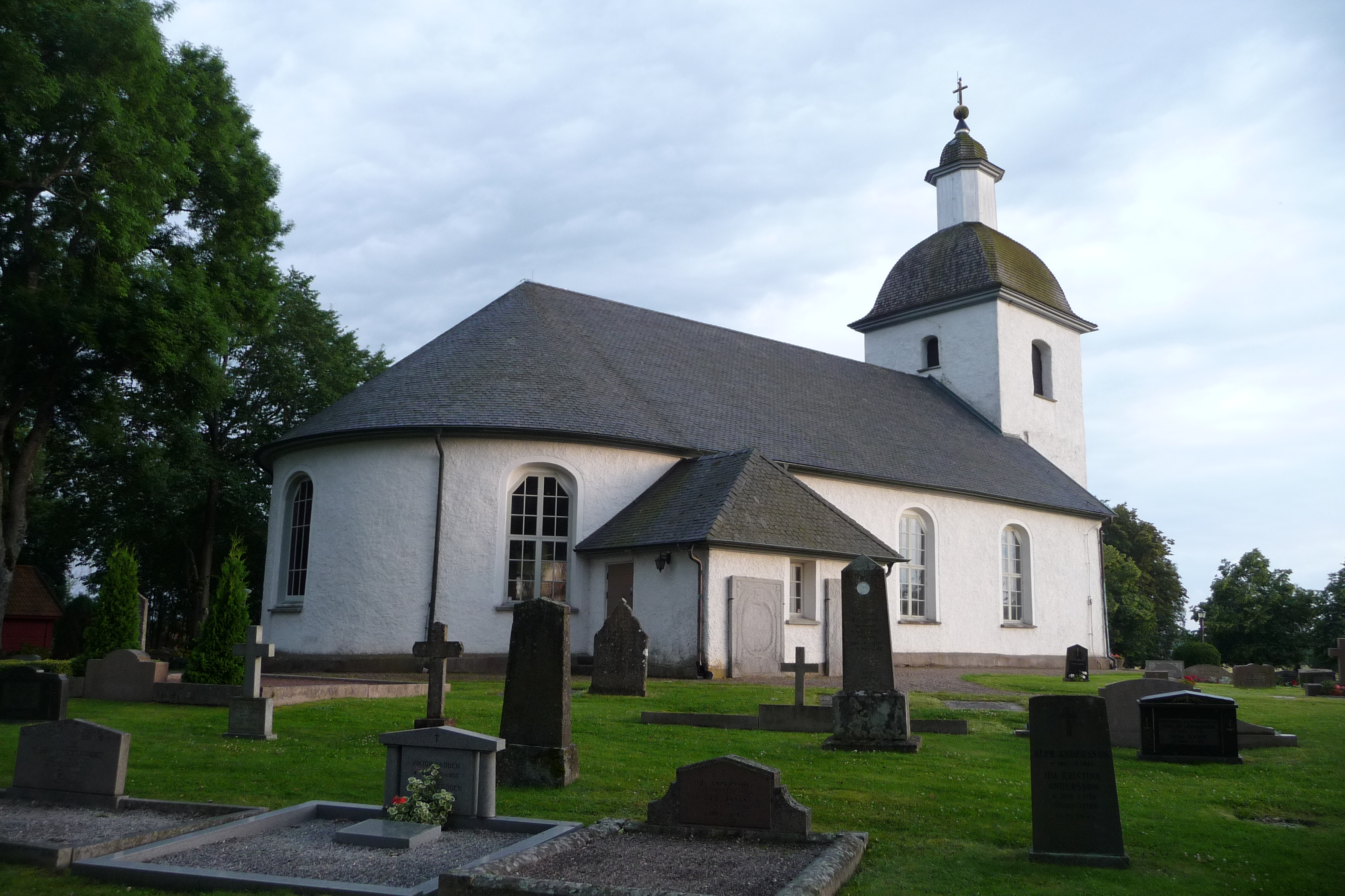 Rydakyrka i Vara pastorat